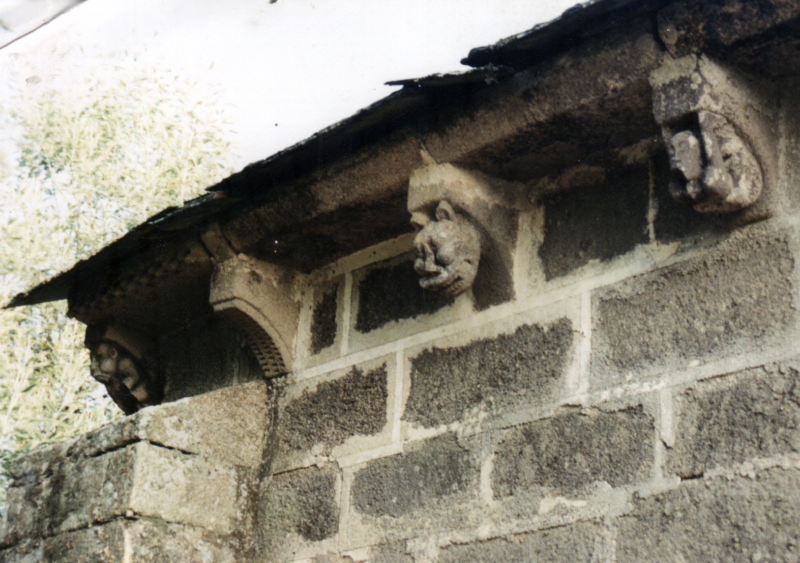 Canecillos de Santo Estevo de Lousadela (Sarria)